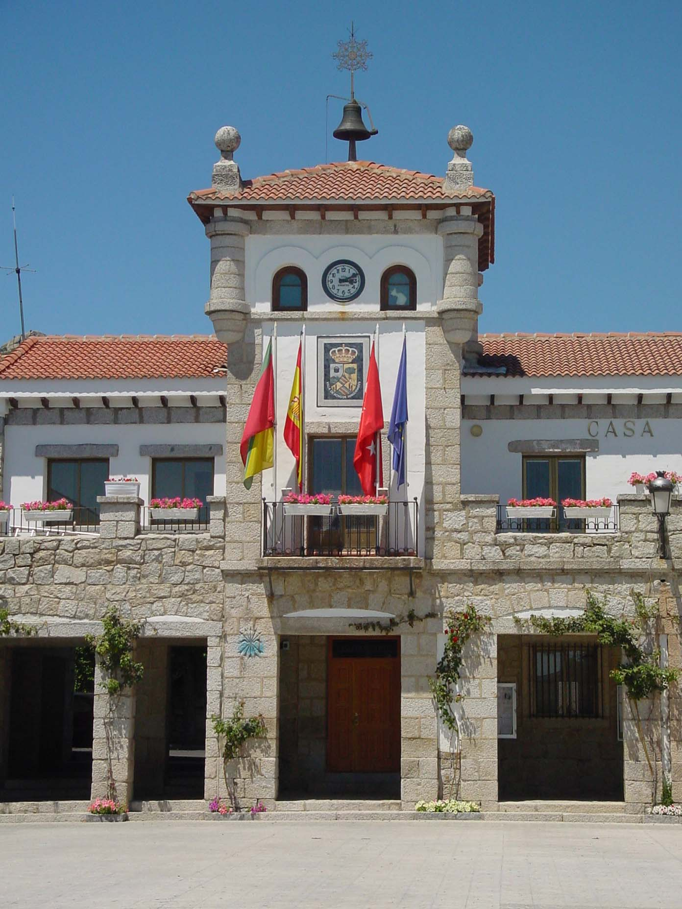 Ayuntamiento de Hoyo de Manzanares.